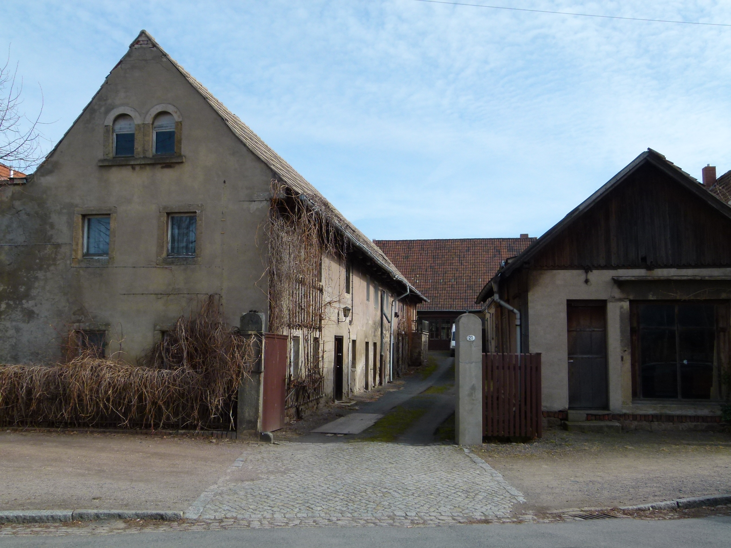 Denkmalgeschützter Dreiseithof, Altnaundorf 21, Radebeul